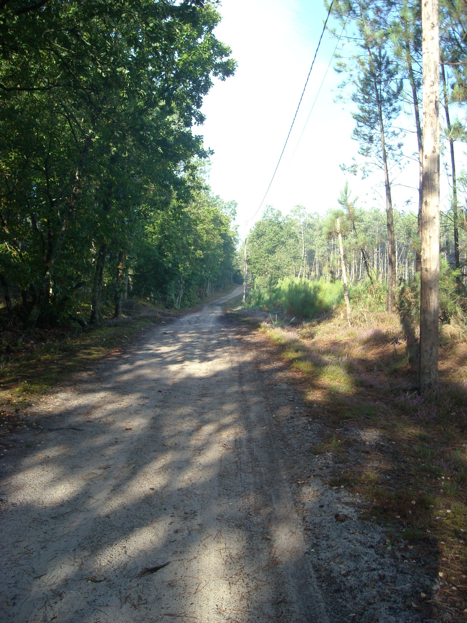 Le chemin du moulin de Fresne à Challes